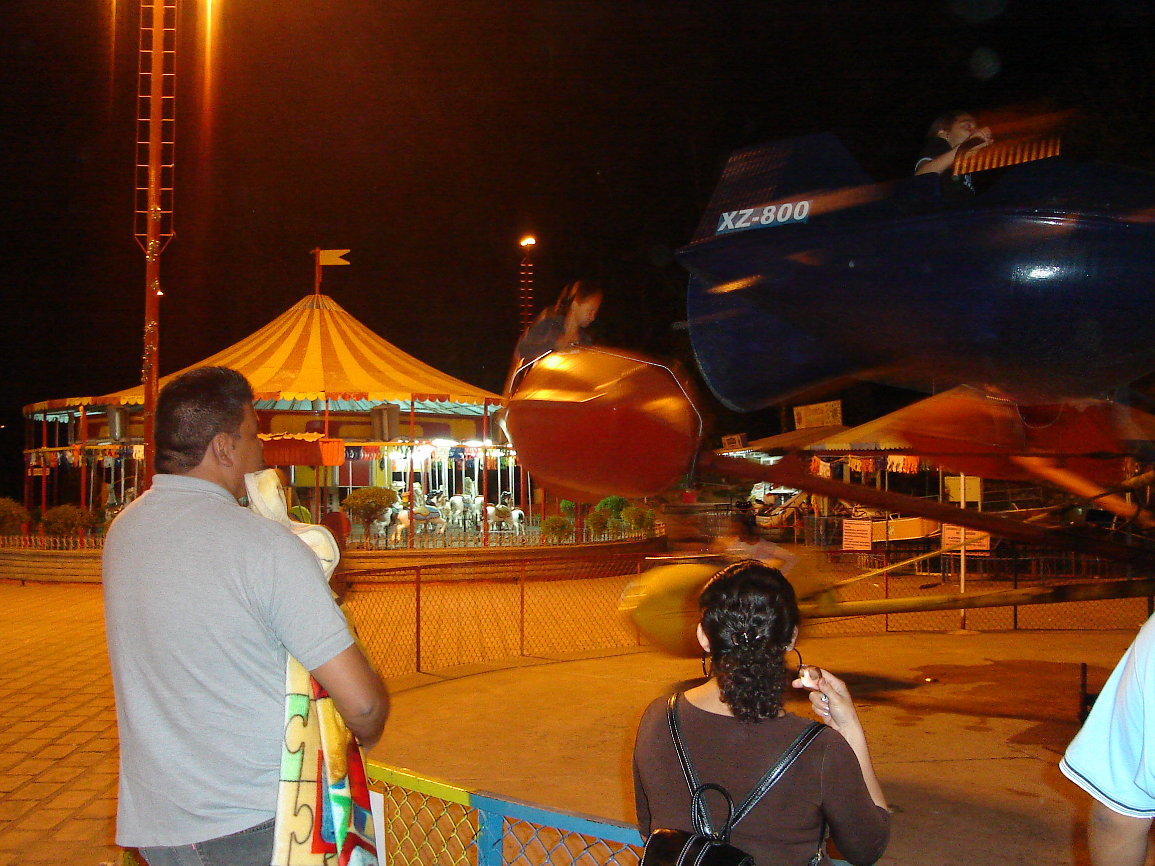 Avioncitos del Parque Infantil Ostimuri de Ciudad Obregón